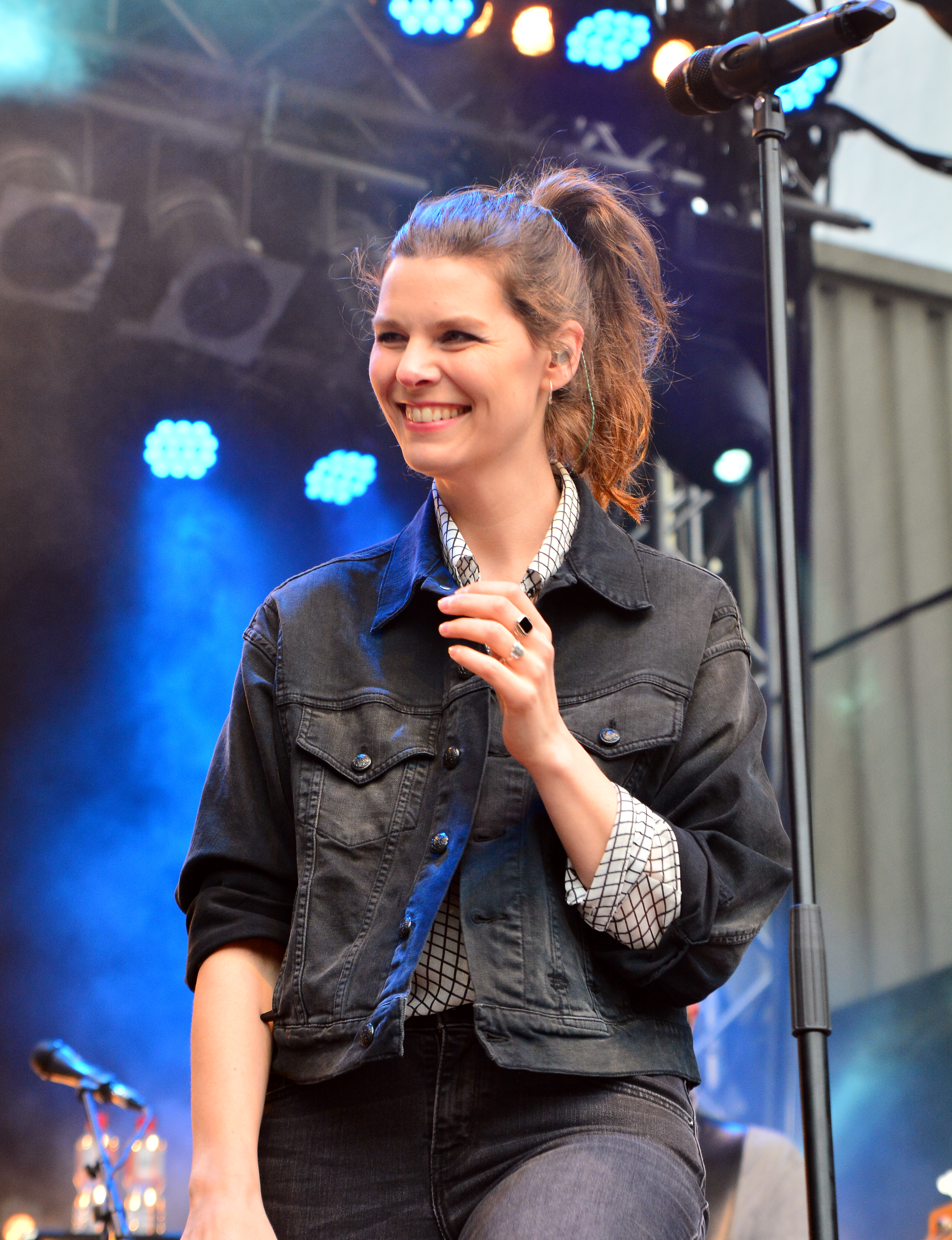 Eva Briegel von Juli beim „Holsten Brauereifest 2015“ in Hamburg